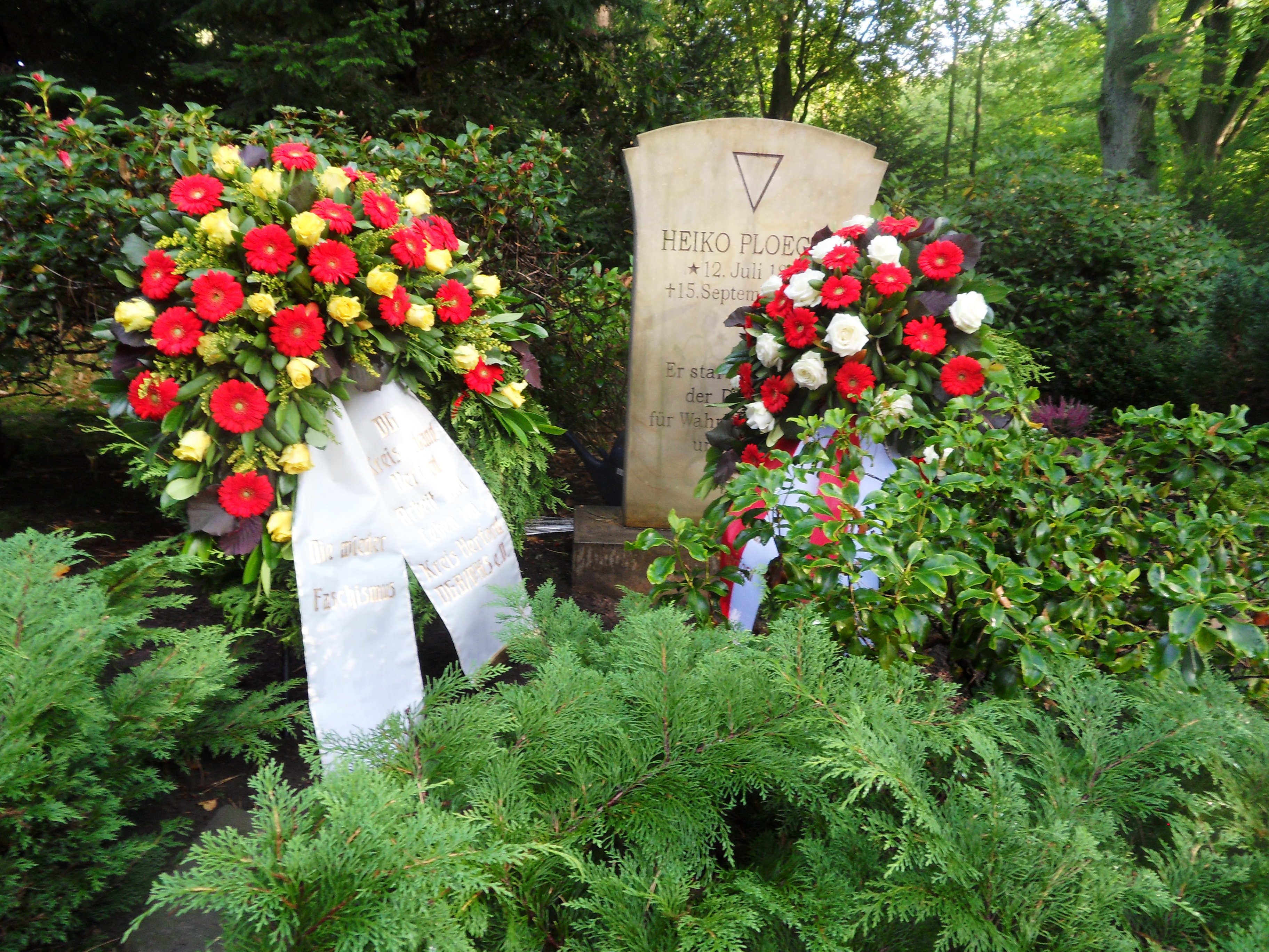 Grabstein von Heiko Ploeger 2017 mit Kränzen von Stadt und DGB